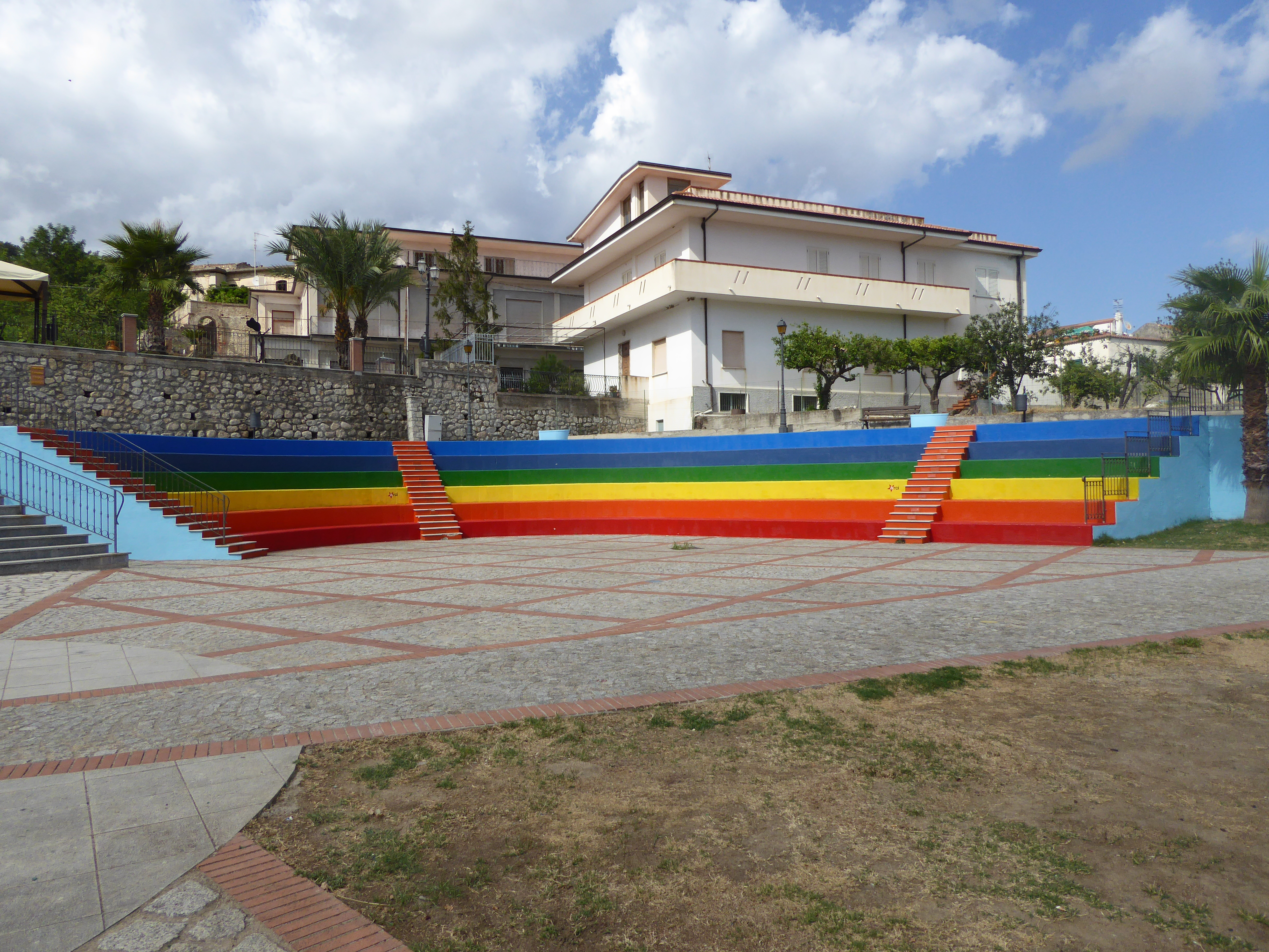 Anfiteatro di Riace